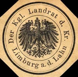 Sealing stamp Title: Der Königliche Landrat des Kreises Limburg an der Lahn Description: Briefsiegel, grau, schwarz Place: Limburg size: 4 cm